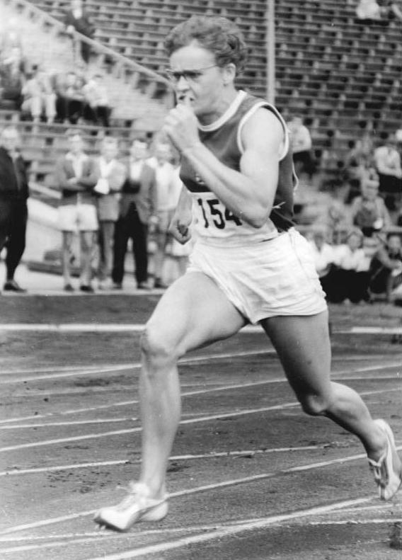 Gisela Birkemeyer Zentralbild Koch Sd-Noa 24.7.1960 Leipzig: Deutsche Leichtathletikmeisterschaften im Leipziger Zentralstadion UBz: Deutsche Meisterin über 100 m wurde in der Zeit von 11,6 Sekunden Gisela Birkemeyer (SC Dynamo Berlin) .